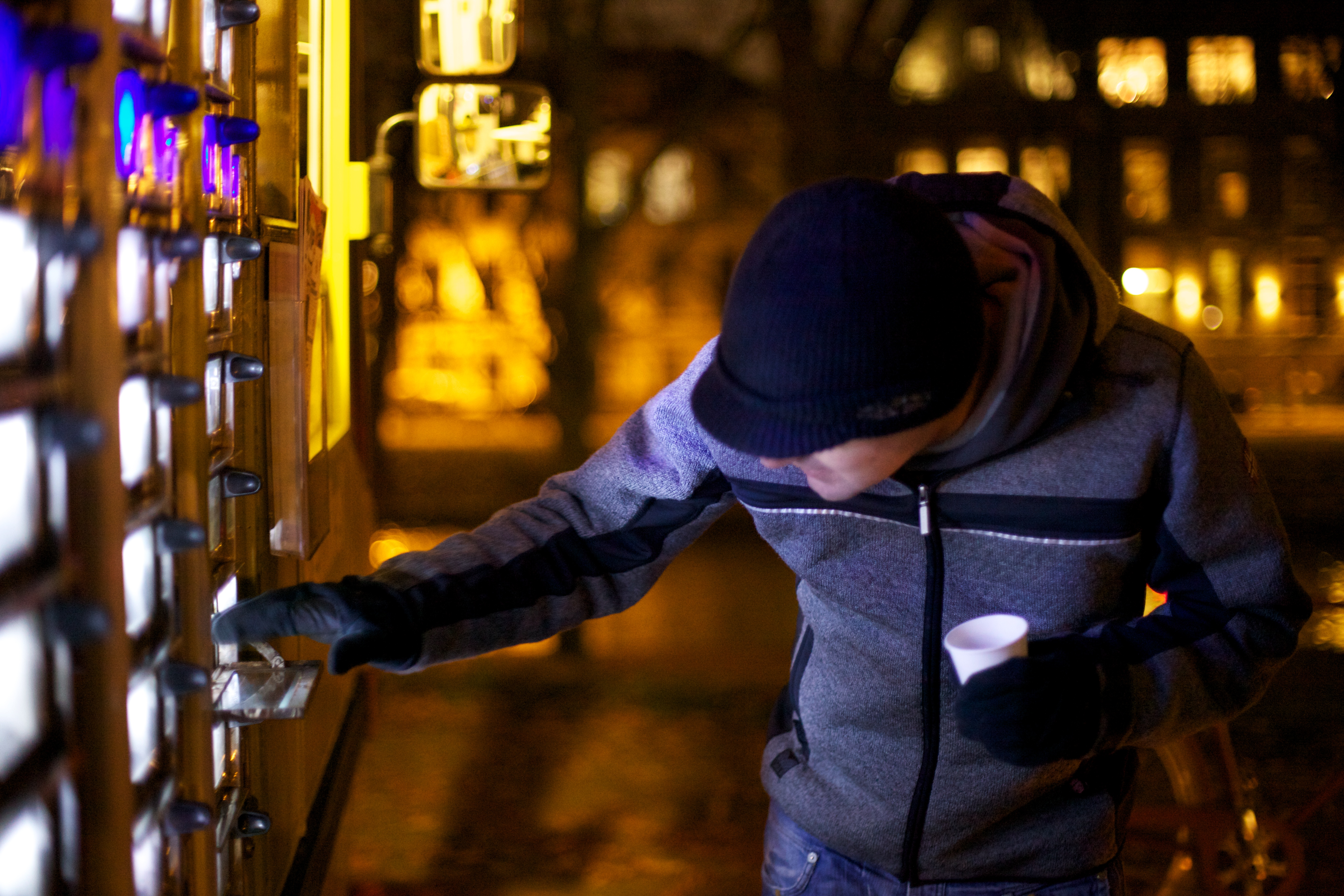 Volle maanbus #2: Heksenketel